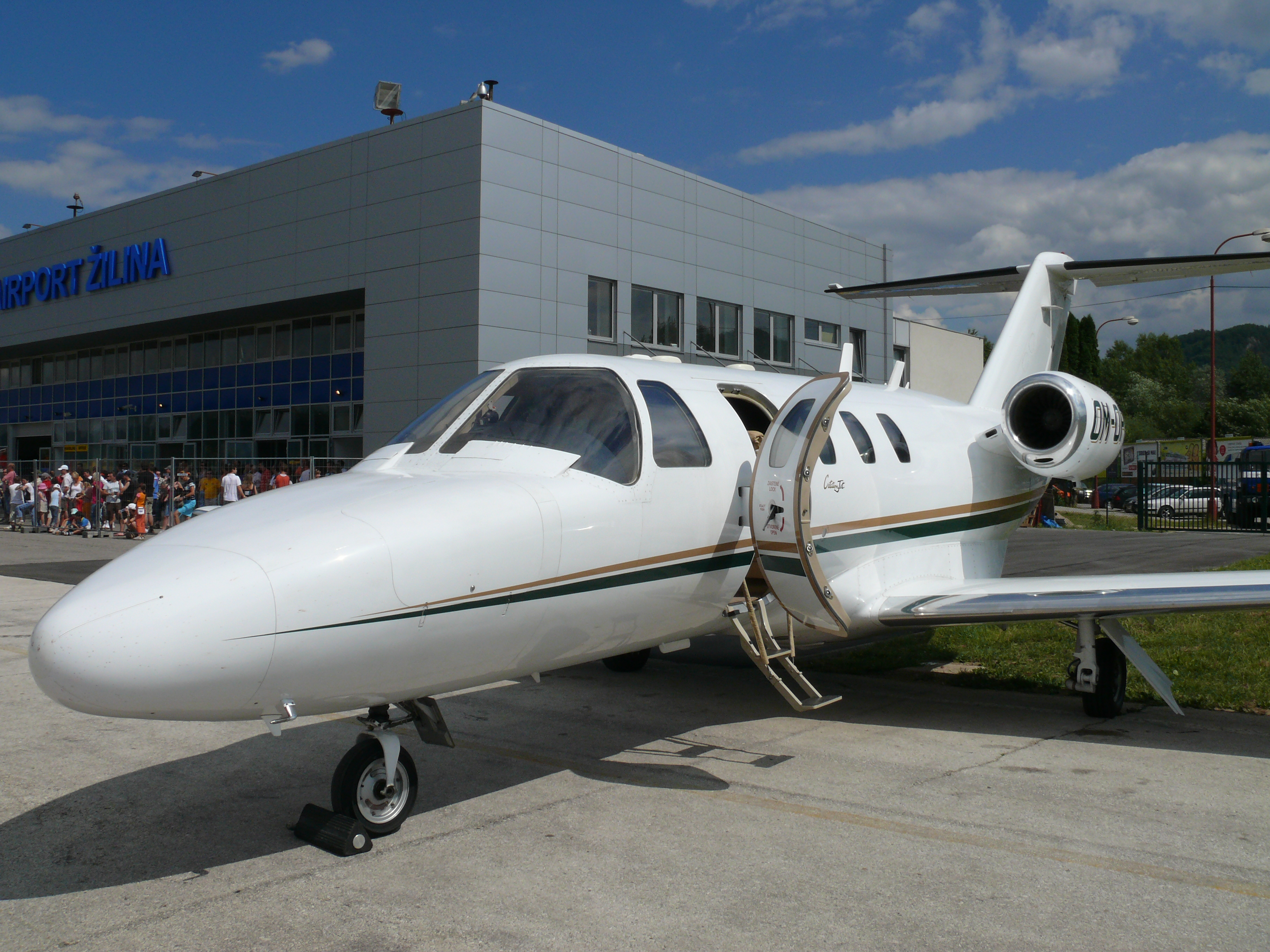 28.06.2008 - Medzinárodný letecký deň pri príležitosti 55. výročia založenia Žilinskej Univerzity a 90. výročia vzniku československého letectva. (Cessna 525)